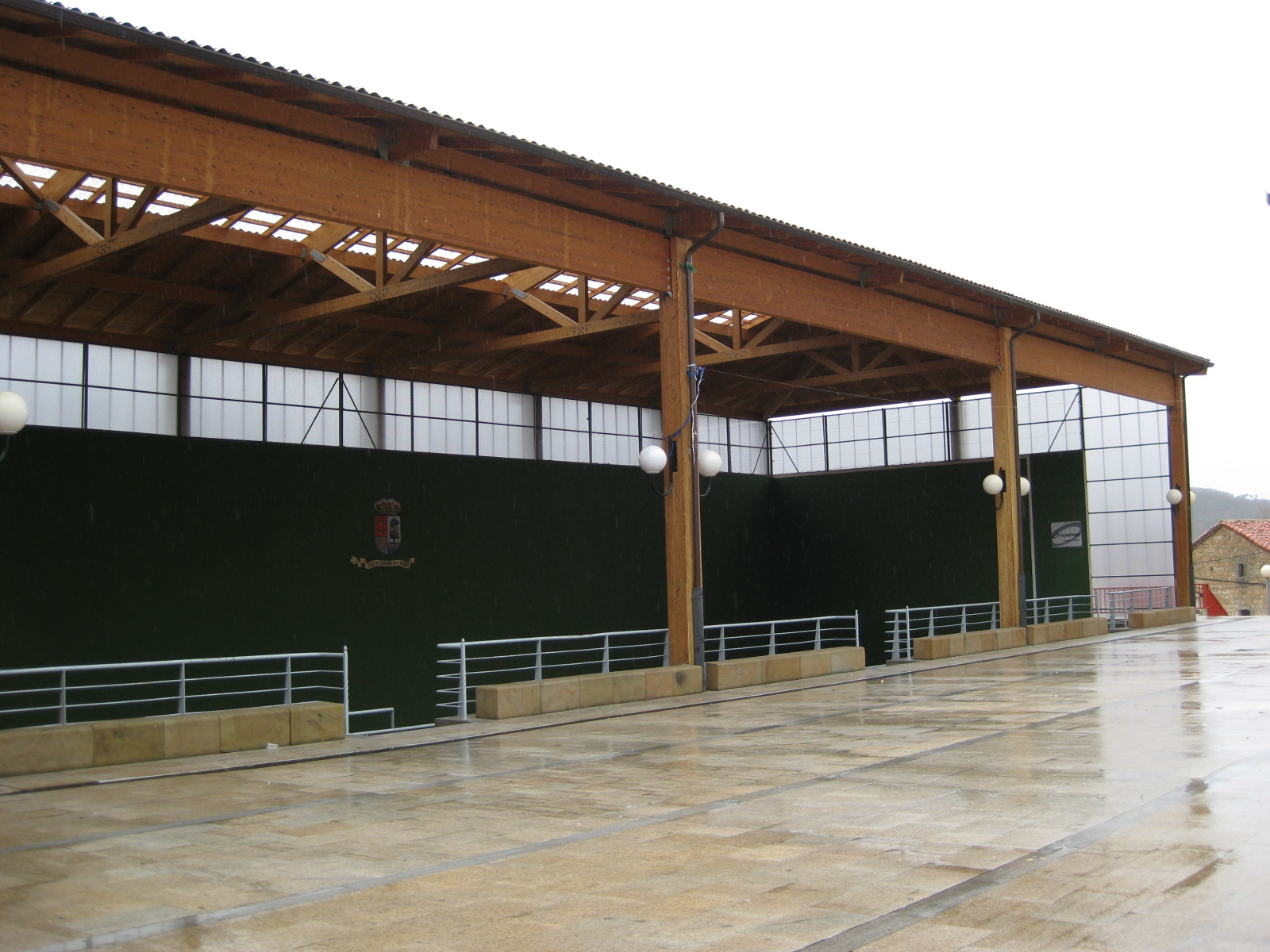 Frontón de Canicosa de la Sierra (Burgos, España).